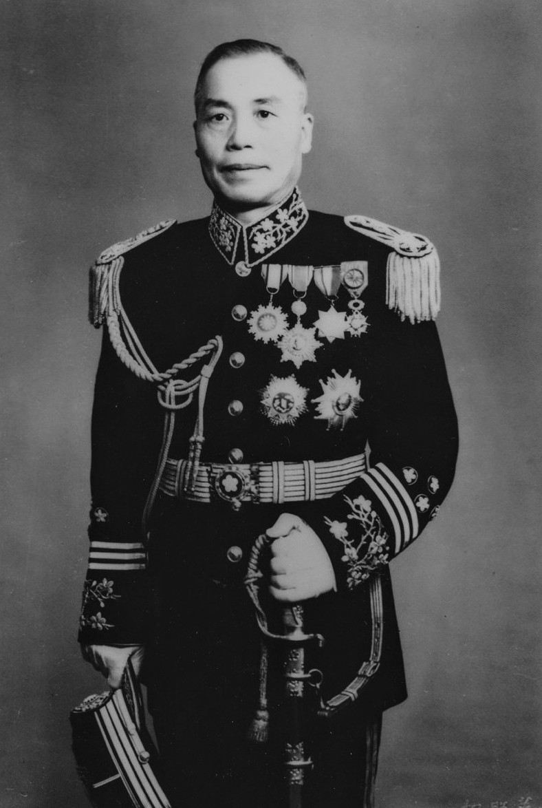 李宗仁戎裝照